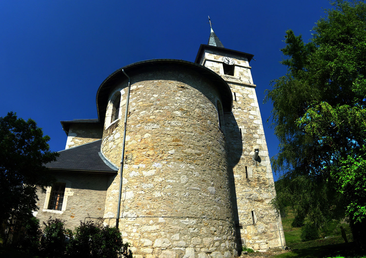 Église Savoyarde typique de Saint-Sulpice, commune de Haute-Savoie, France.